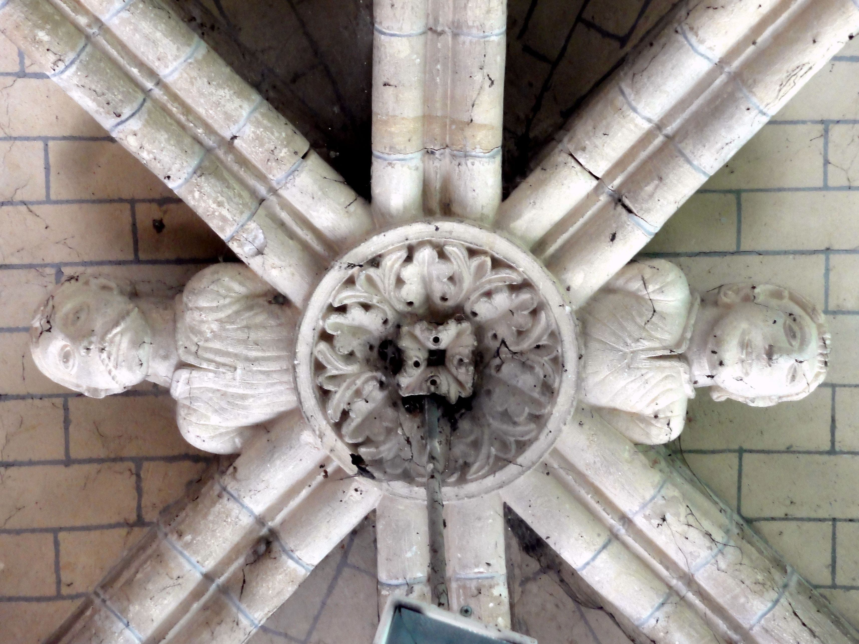 Clé de voûte de la première travée du chœur.